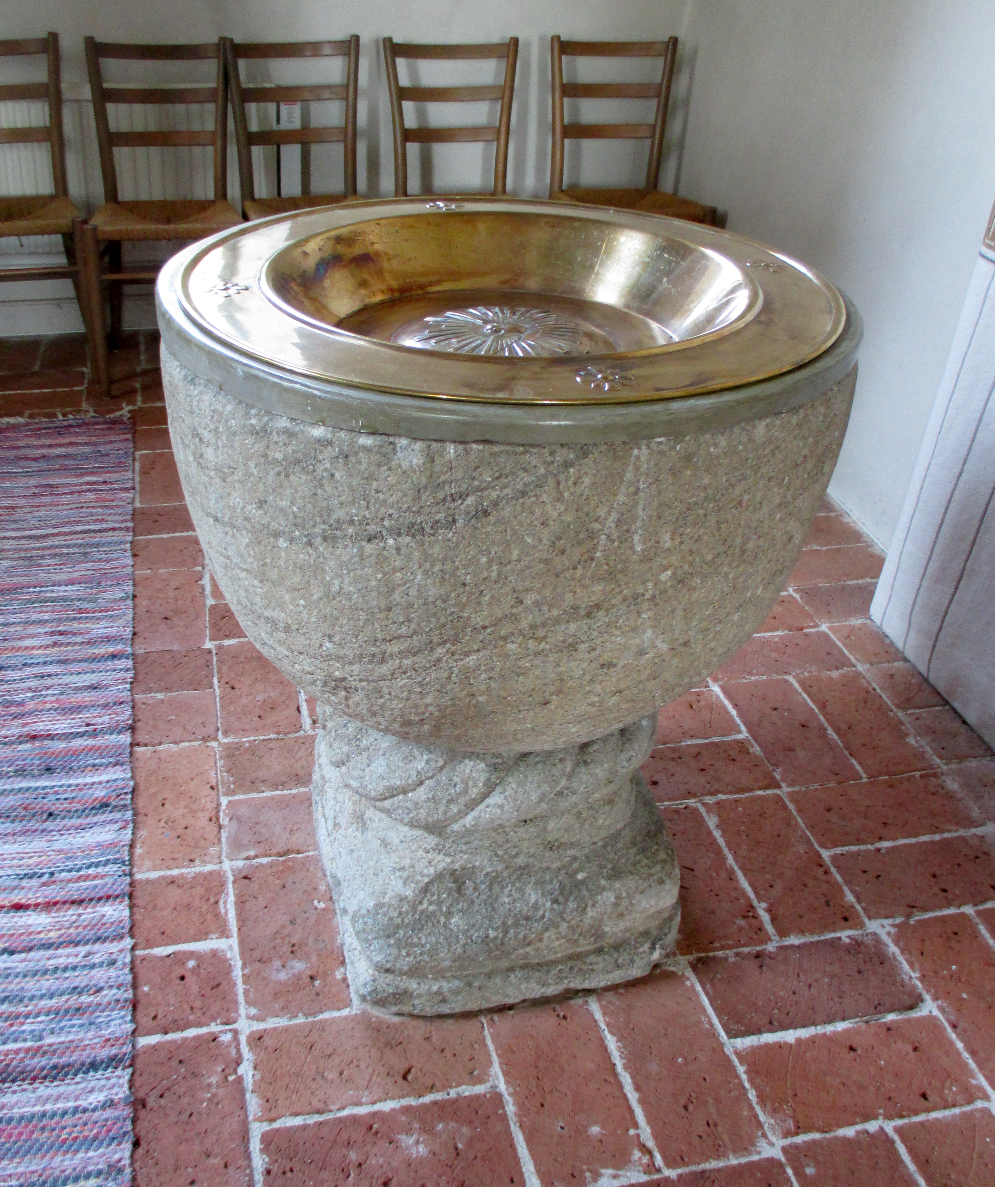 Romansk dopfunt i Gillberga kyrka i Eskilstuna kommun, Södermanland, Sverige.